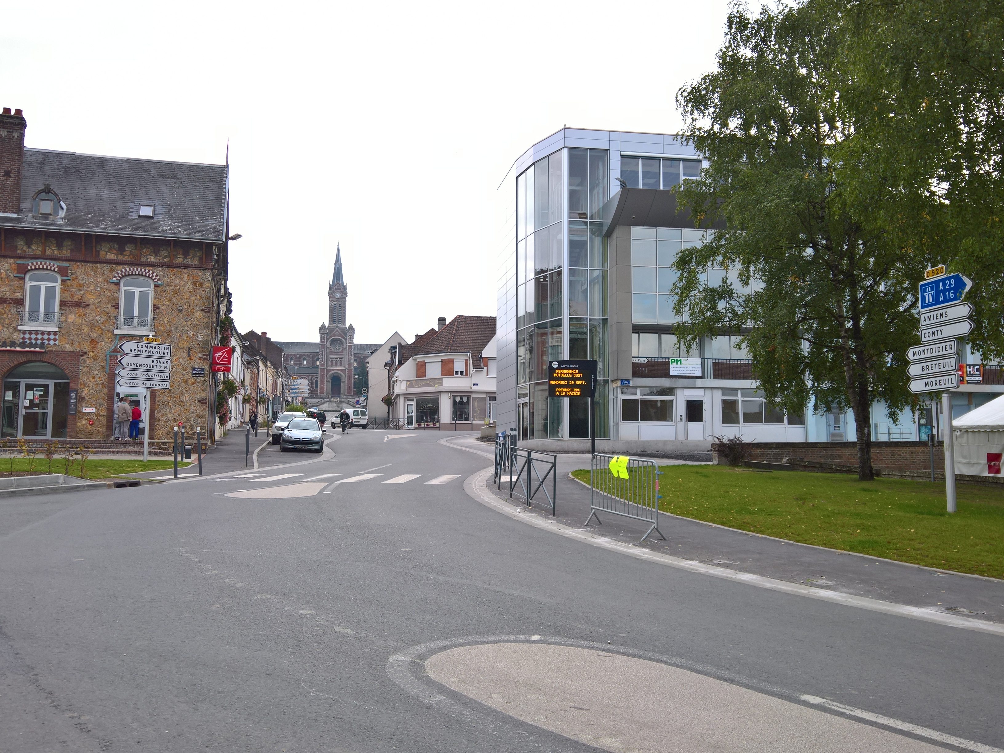 Vue générale d'Ailly-sur-Noye depuis la RD 920 : à droite, la mairie, au fond, l'église.